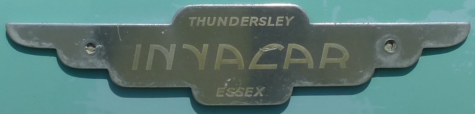 Emblem Invacar